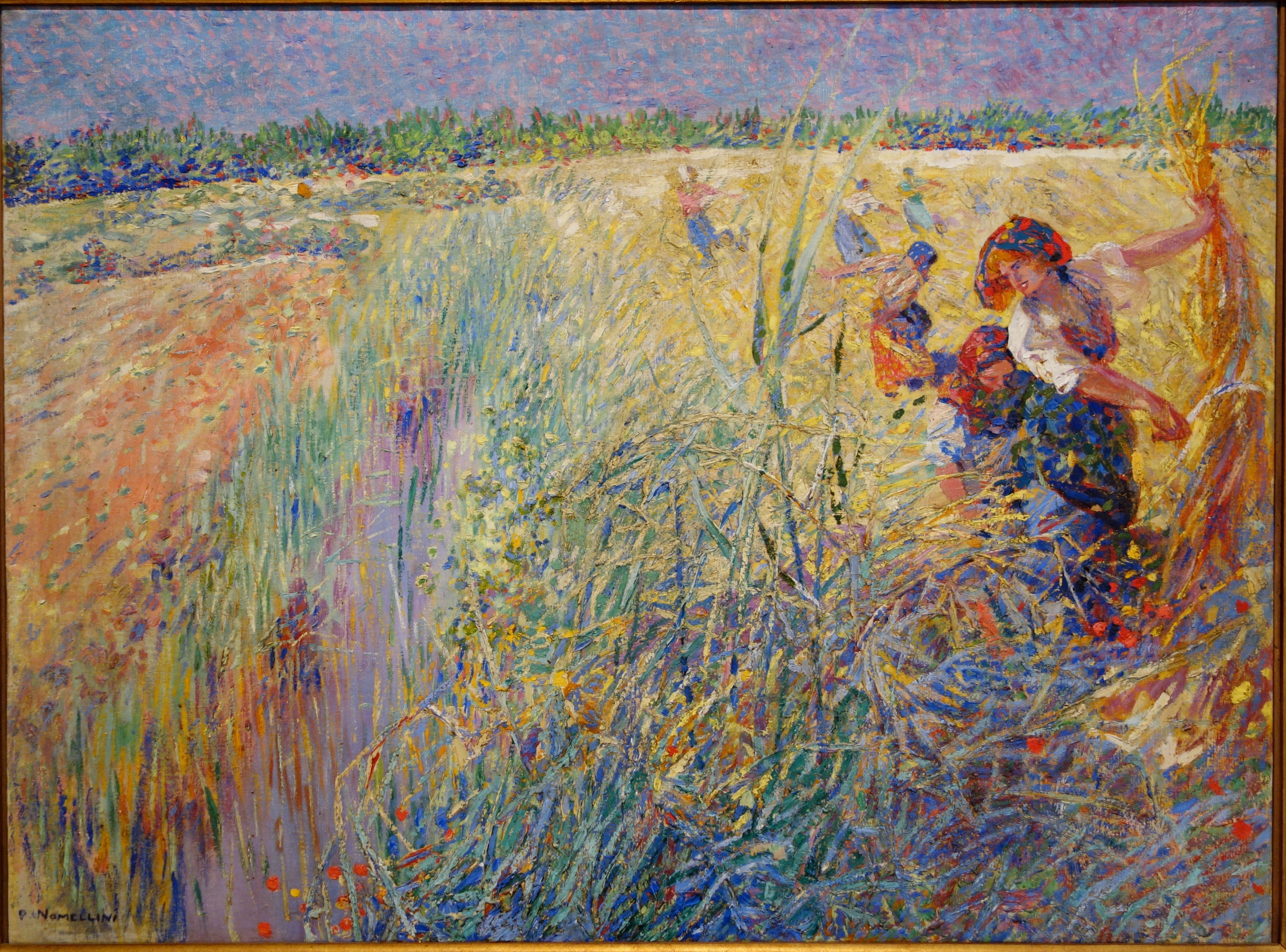 Harvestlabel QS:Lde,"Ernte"label QS:Len,"Harvest"